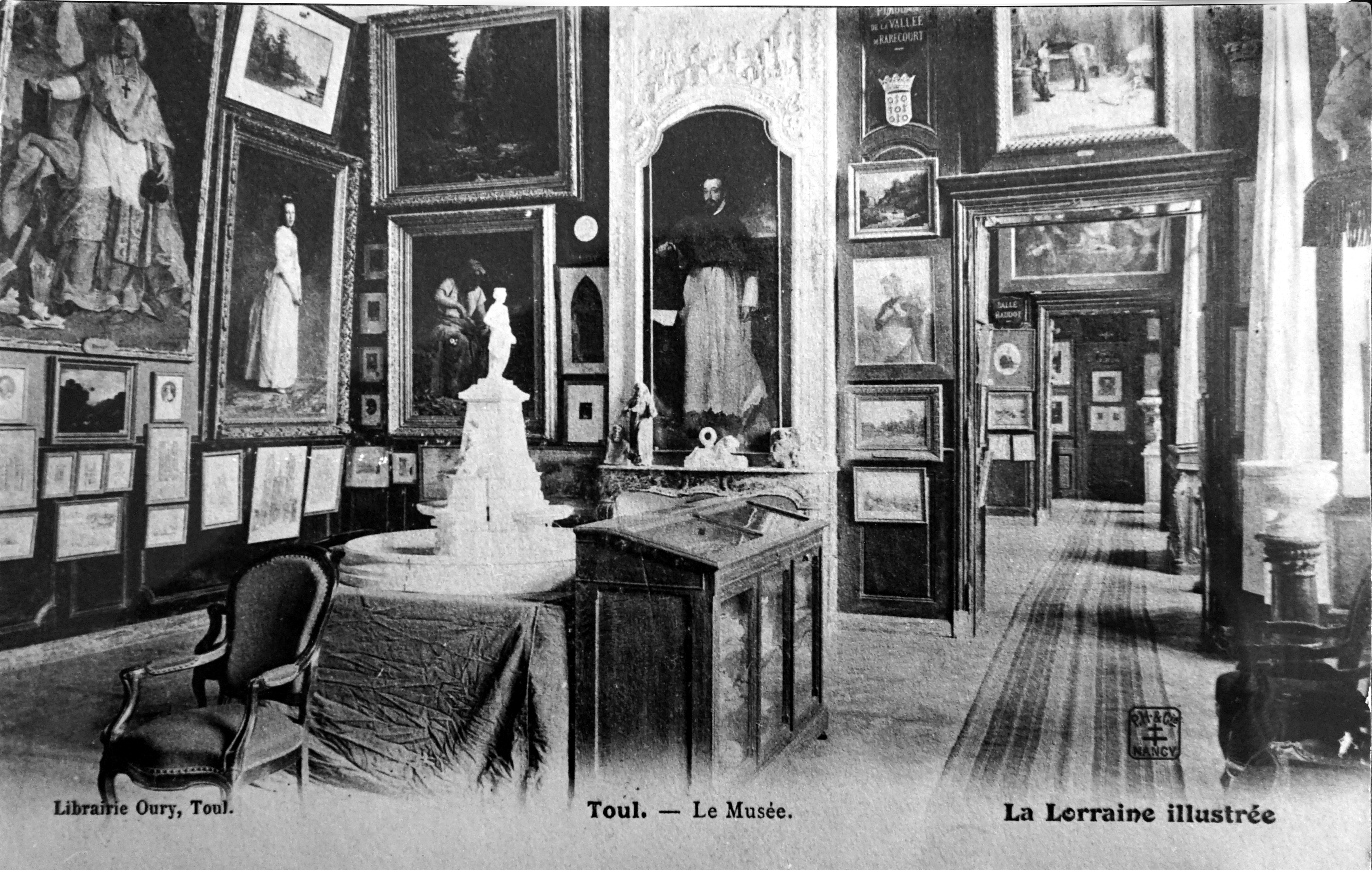 vue ancienne du musée qui se trouvait alors dans les bâtiments de l'archeveché.